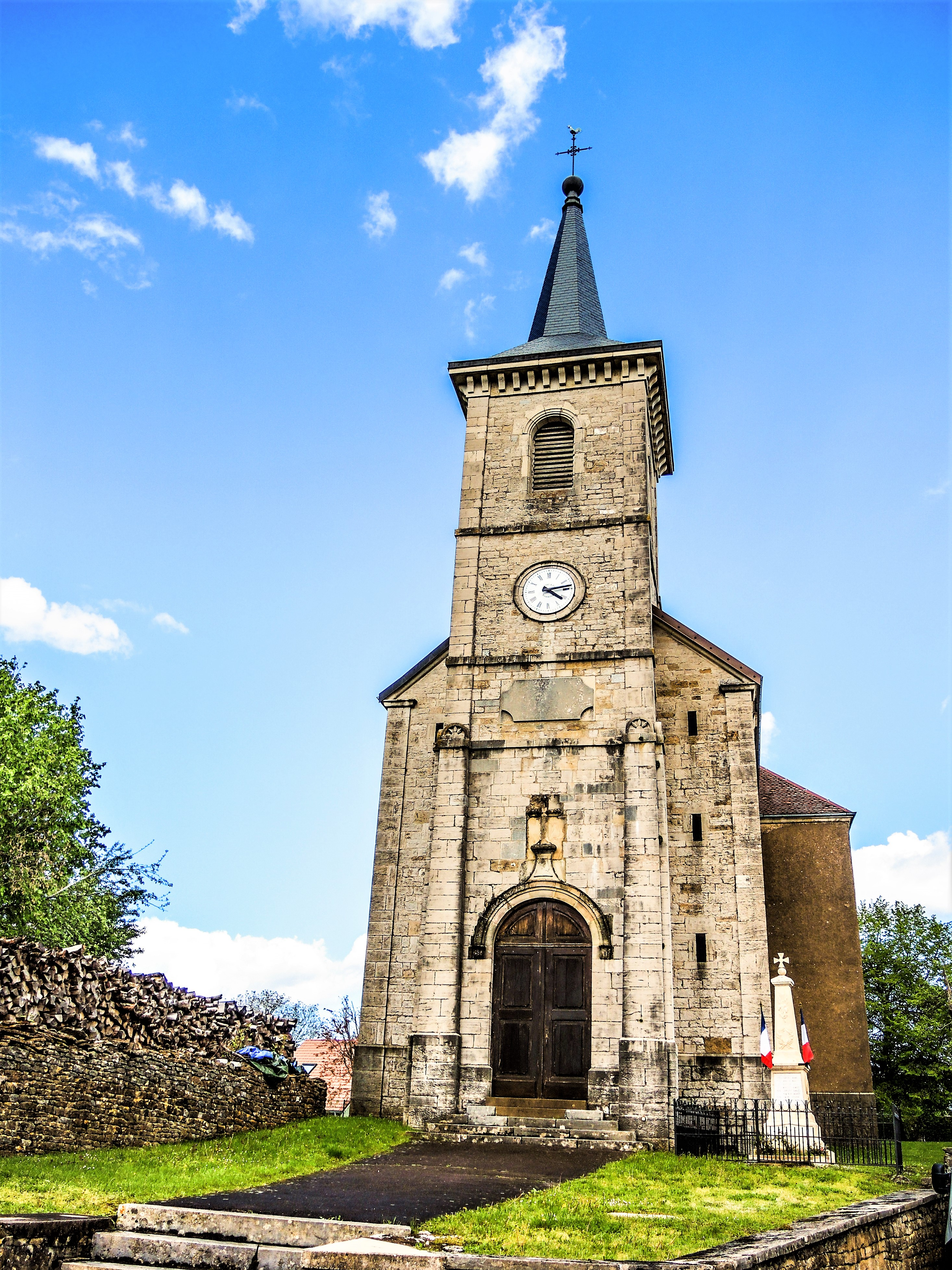 Eglise de Fontenelle-Montby